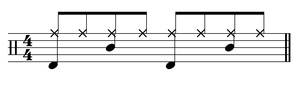 4/4-Takt